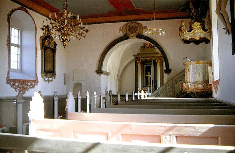 Sjørslev Kirke, kirkerummet set mod øst